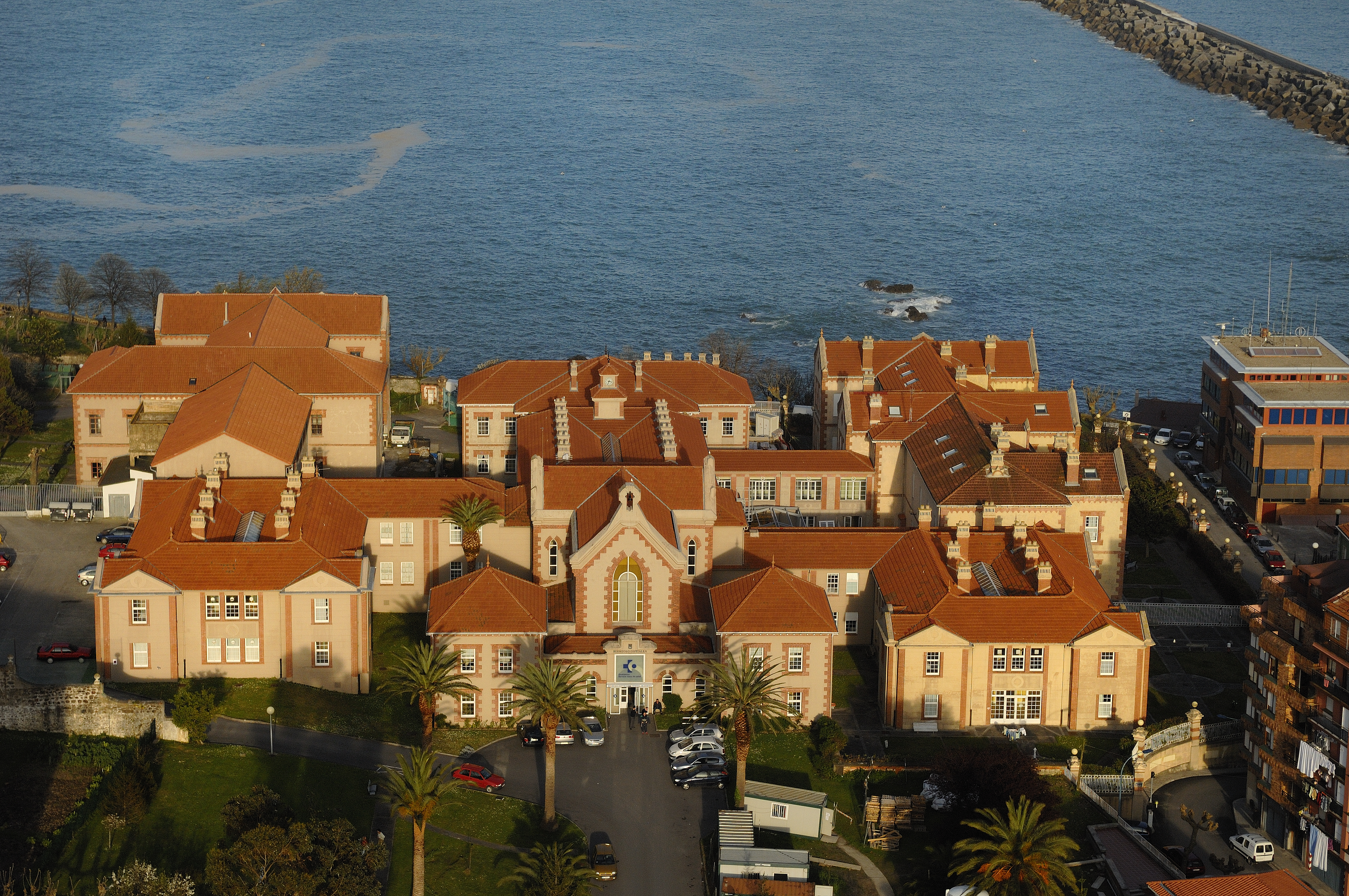 Bermeoko ospitale psikiatrikoa, airetik